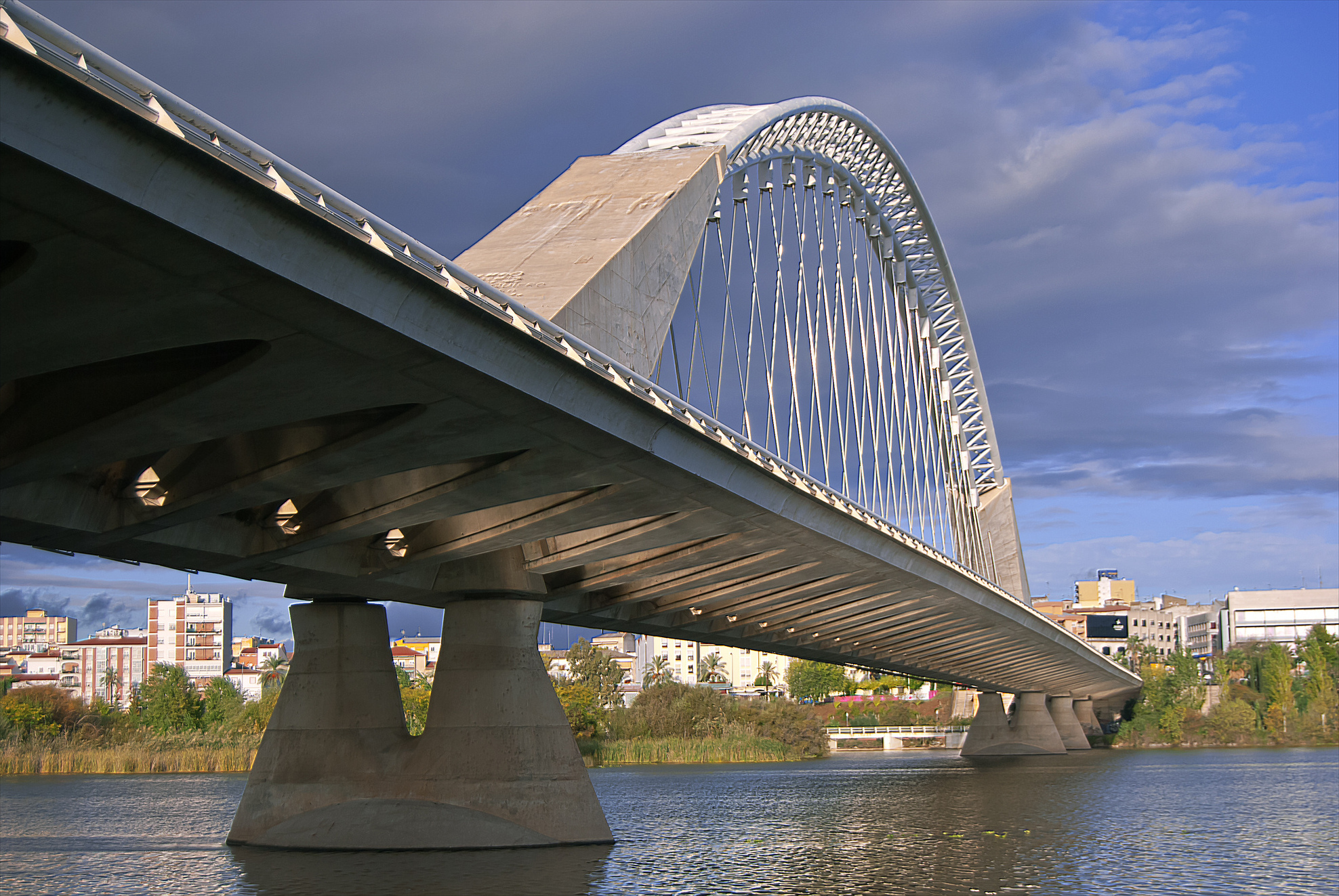 Puente sobre el río Guadiana, Mérida.